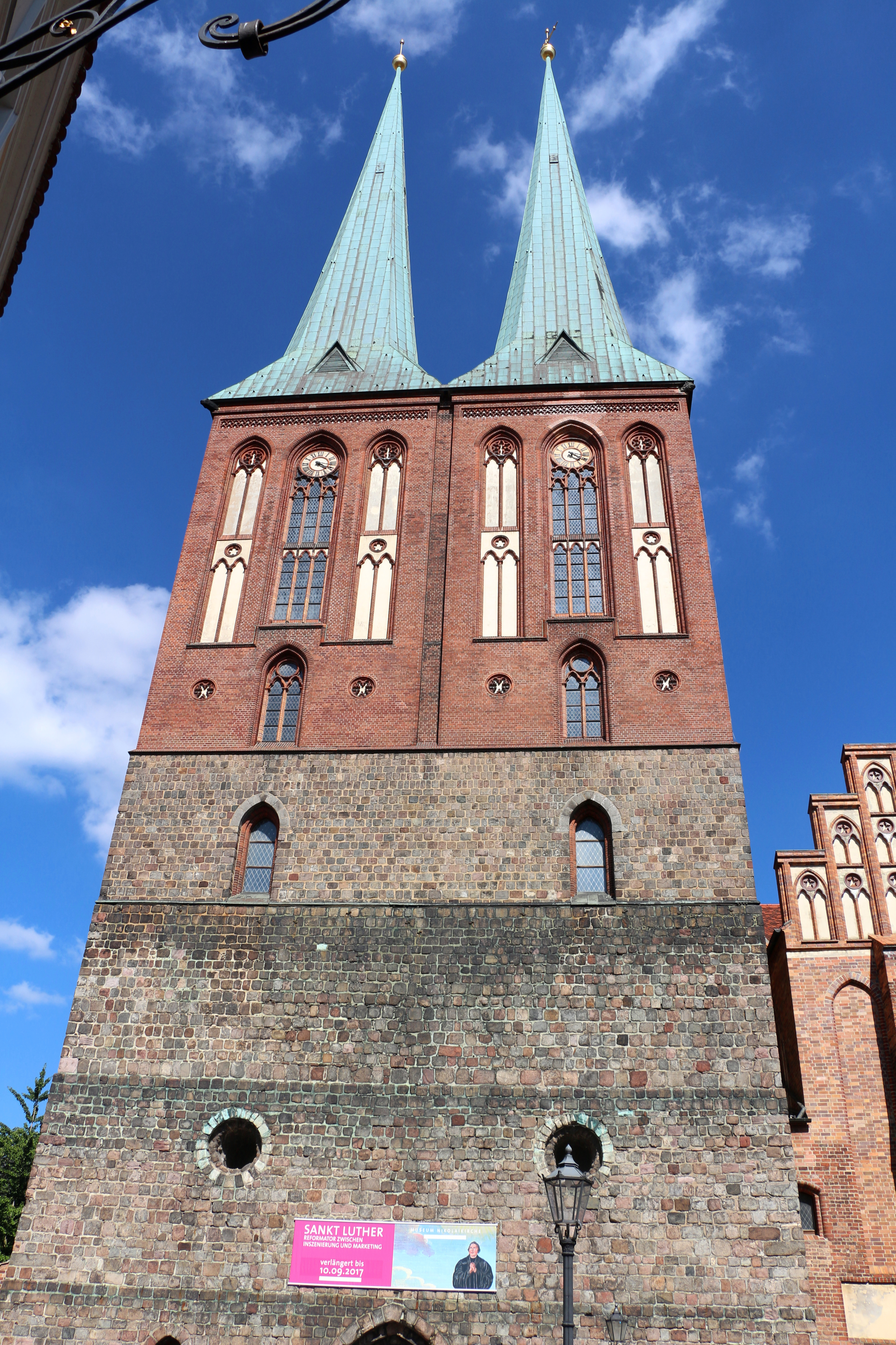 Doppeltürme der Nikolaikirche in BerlinThis is a photograph of an architectural monument.